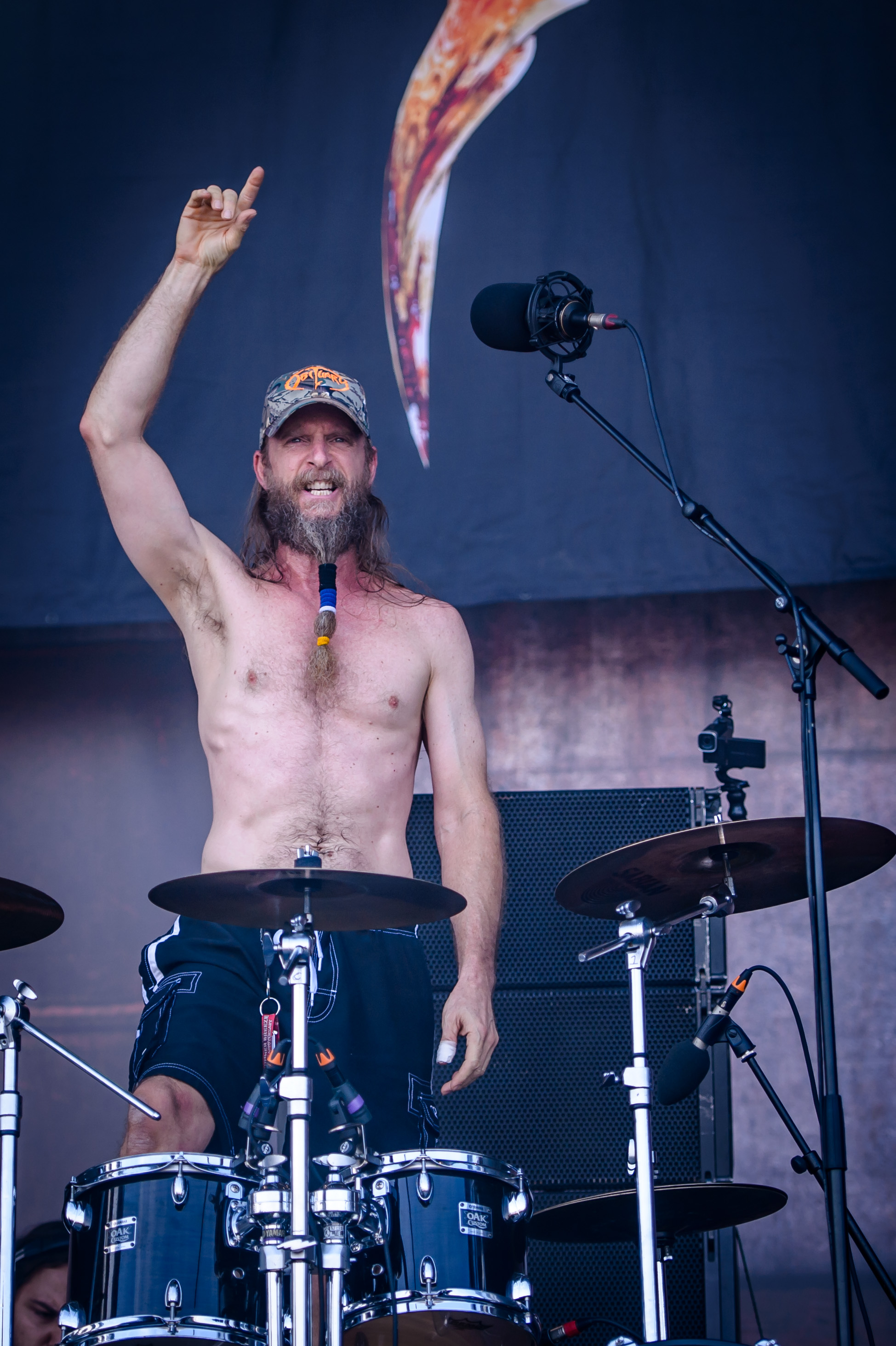 'Summer Breeze Festival 2017; Dinkelsbühl': 'Obituary'